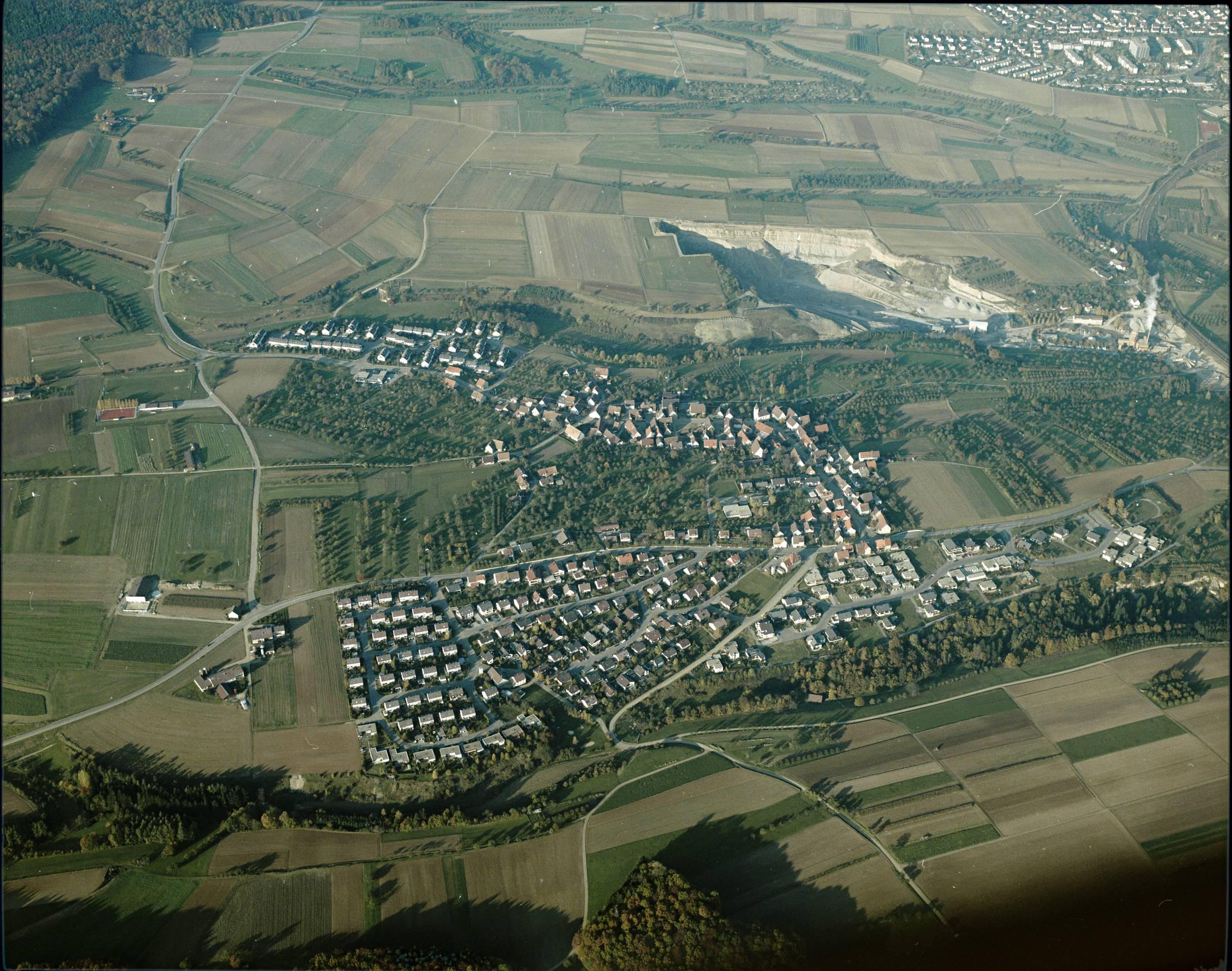 Luftbild von Haslach - Staatsarchiv Sigmaringen - Archivalieneinheit N 1/96 T 1 Nr. 493